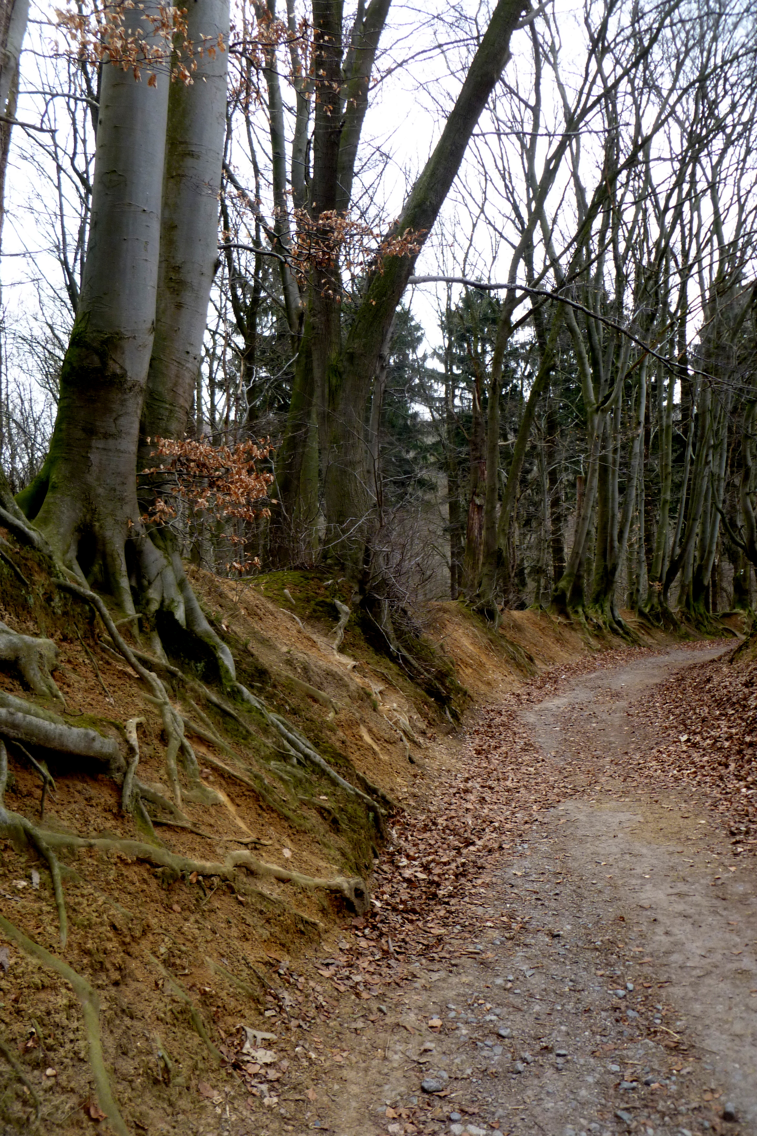 Bodendenkmal Äußerer Landgraben Aachen zw. Berensberg und Wurmtal